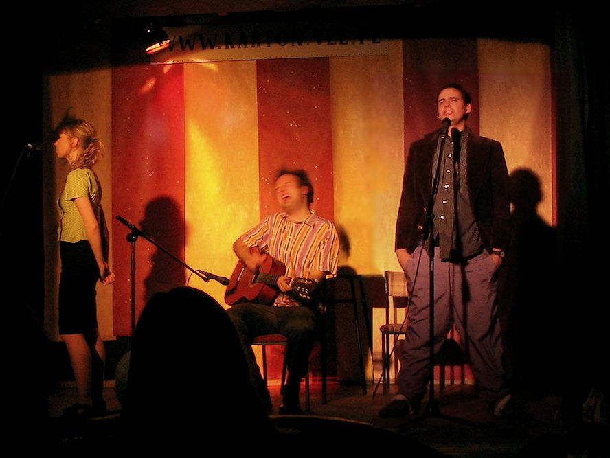 Występ kabaretu Hlynur w studenckim klubie Karton w Zielonej Górze. Listopad 2005